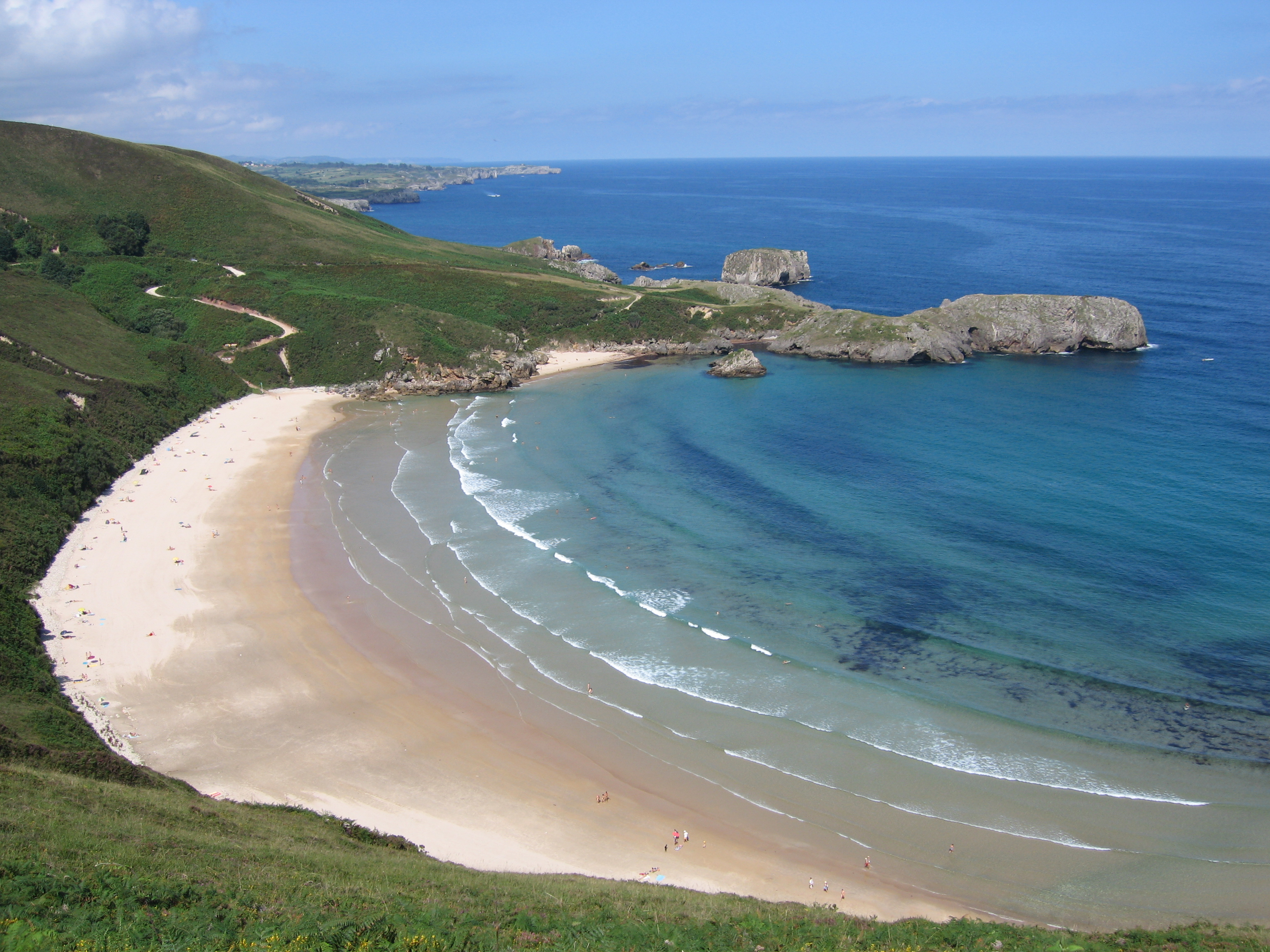 Playa de Torimbia, Niembro (Asturias, Spain)